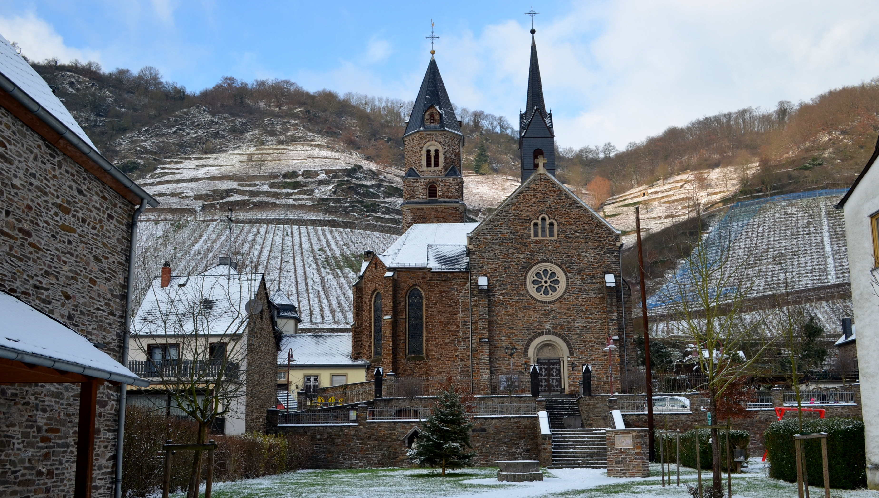 Sint-Rochuskerk